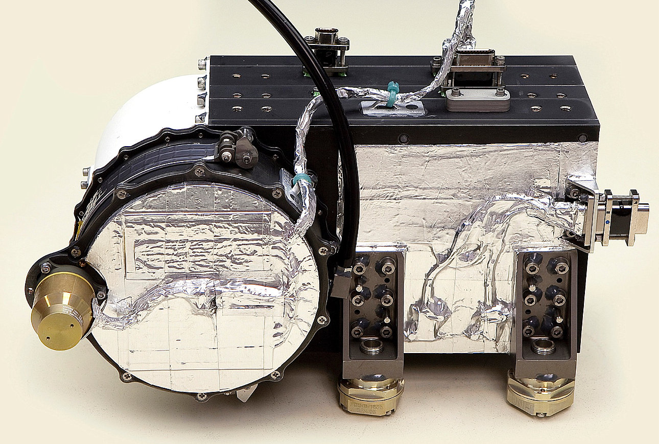 Un des trois détecteurs de particules énergétiques JEDI de la sonde spatiale JUNO de la NASA